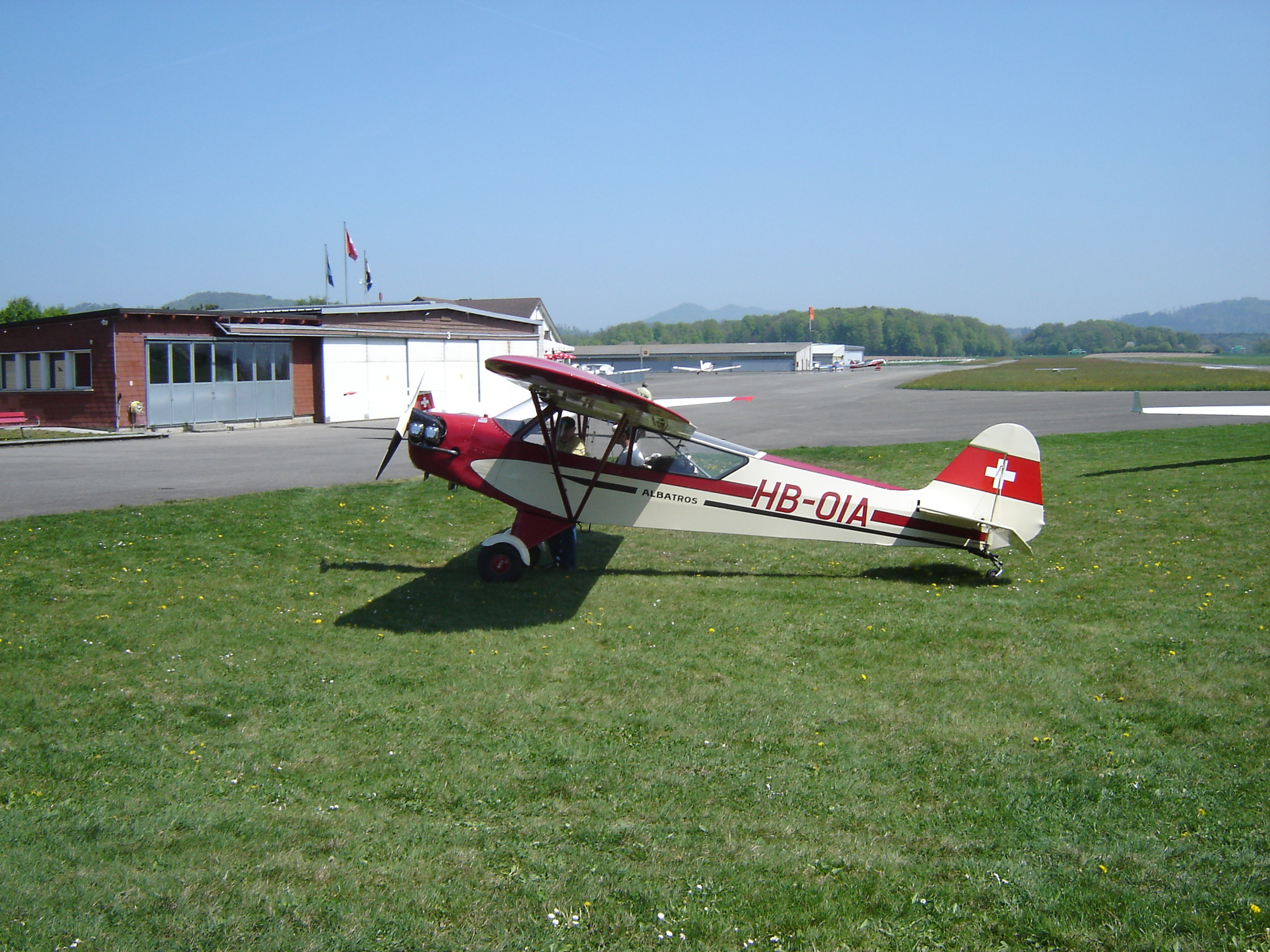 Piper J3C-65/L-4 Cub ((HB-OIA (31.05.1946) / s/n AF 36506 / 1944), Segelflughafen Birrfeld in Lupfig im Kanton Aargau